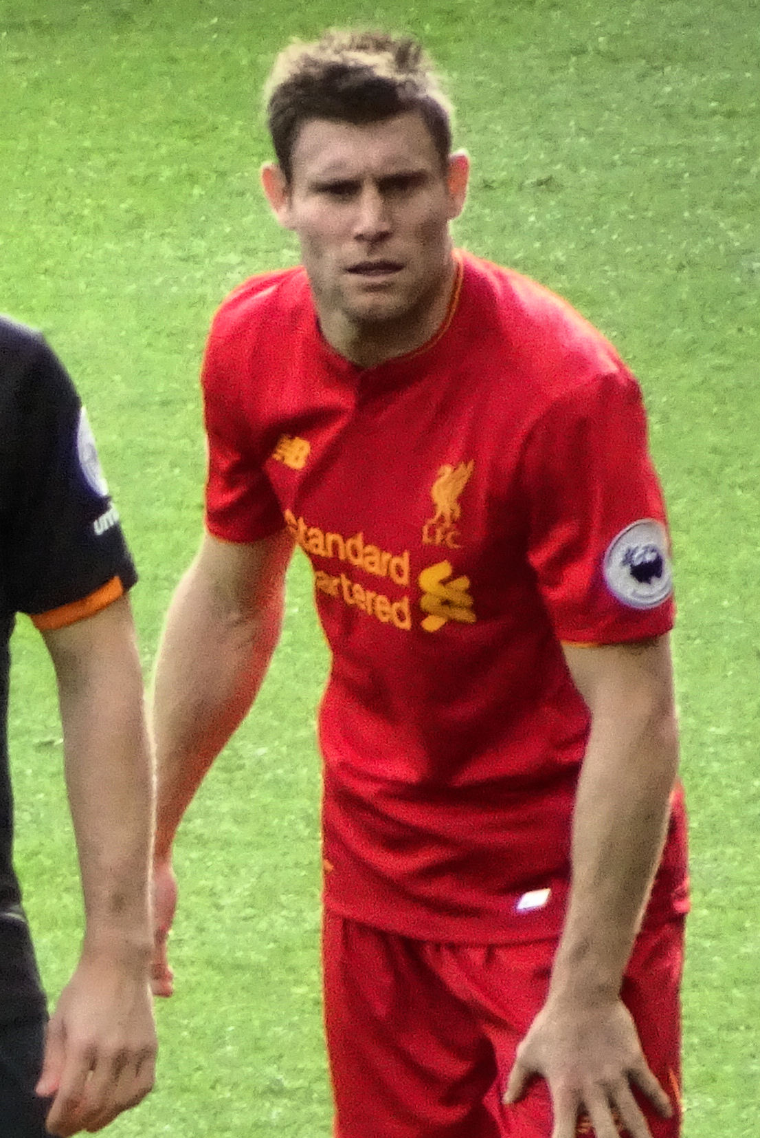 Robert Snodgrass. James Milner